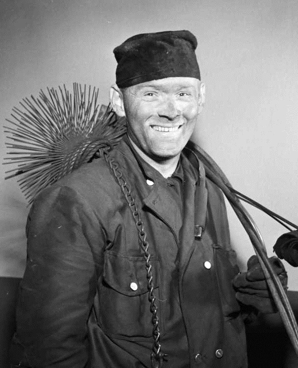 portrett, mann, feier, feierutstyr.